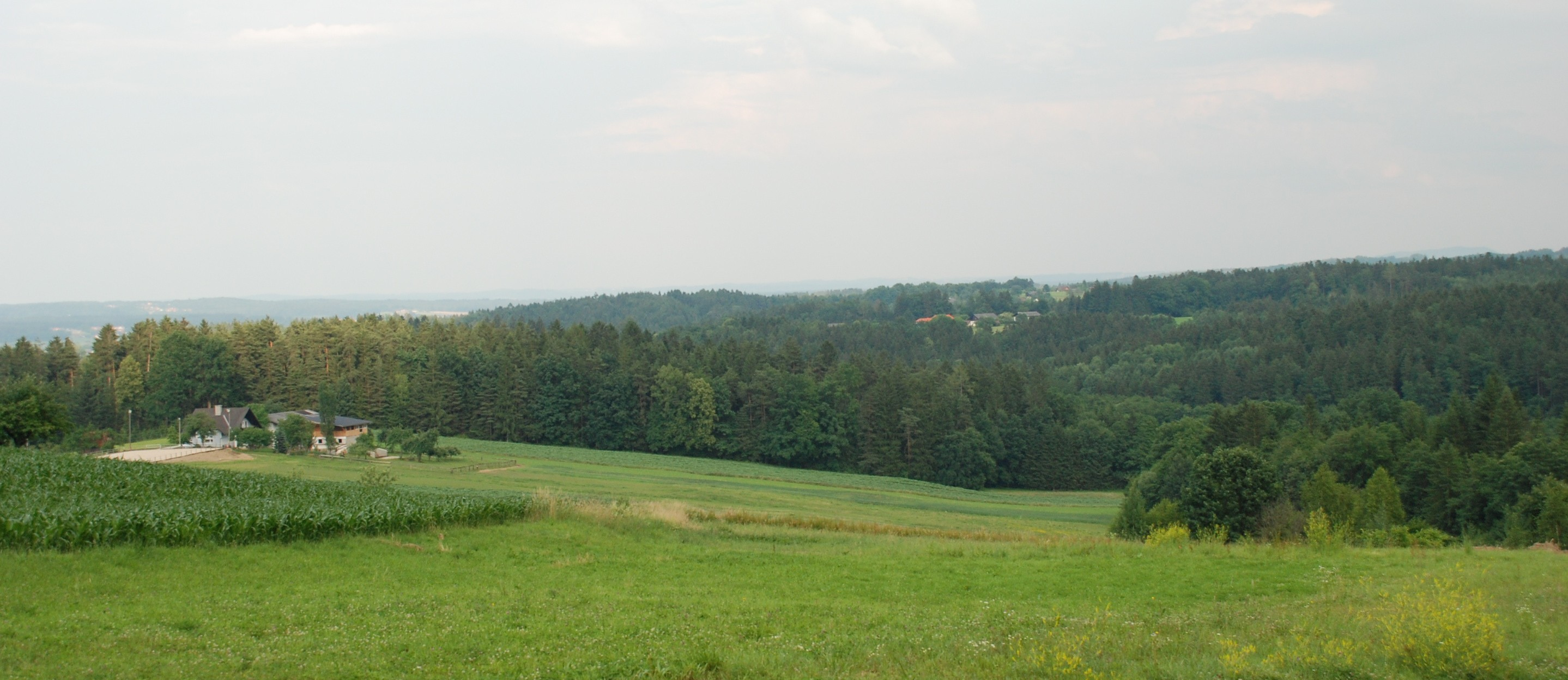 Laßnitztal bei Ligist